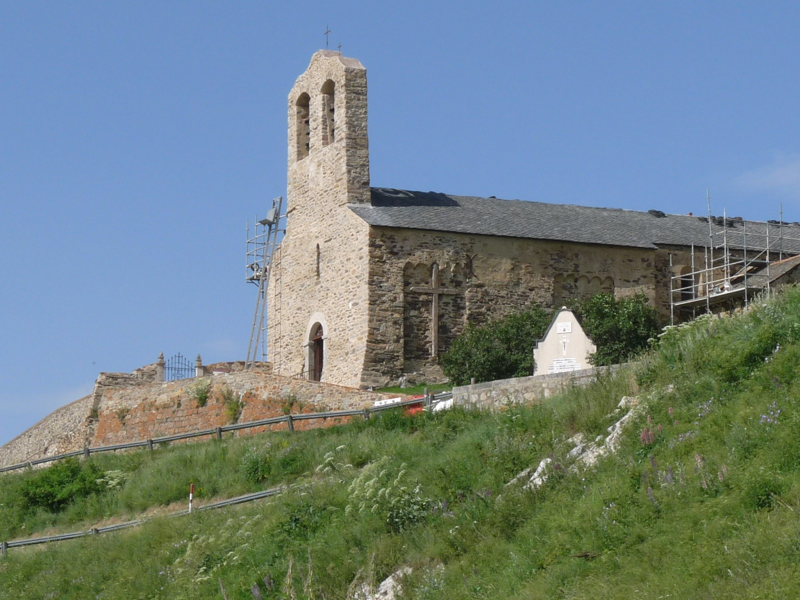 Eglise de Réal, Pyrénées-Orientales, France